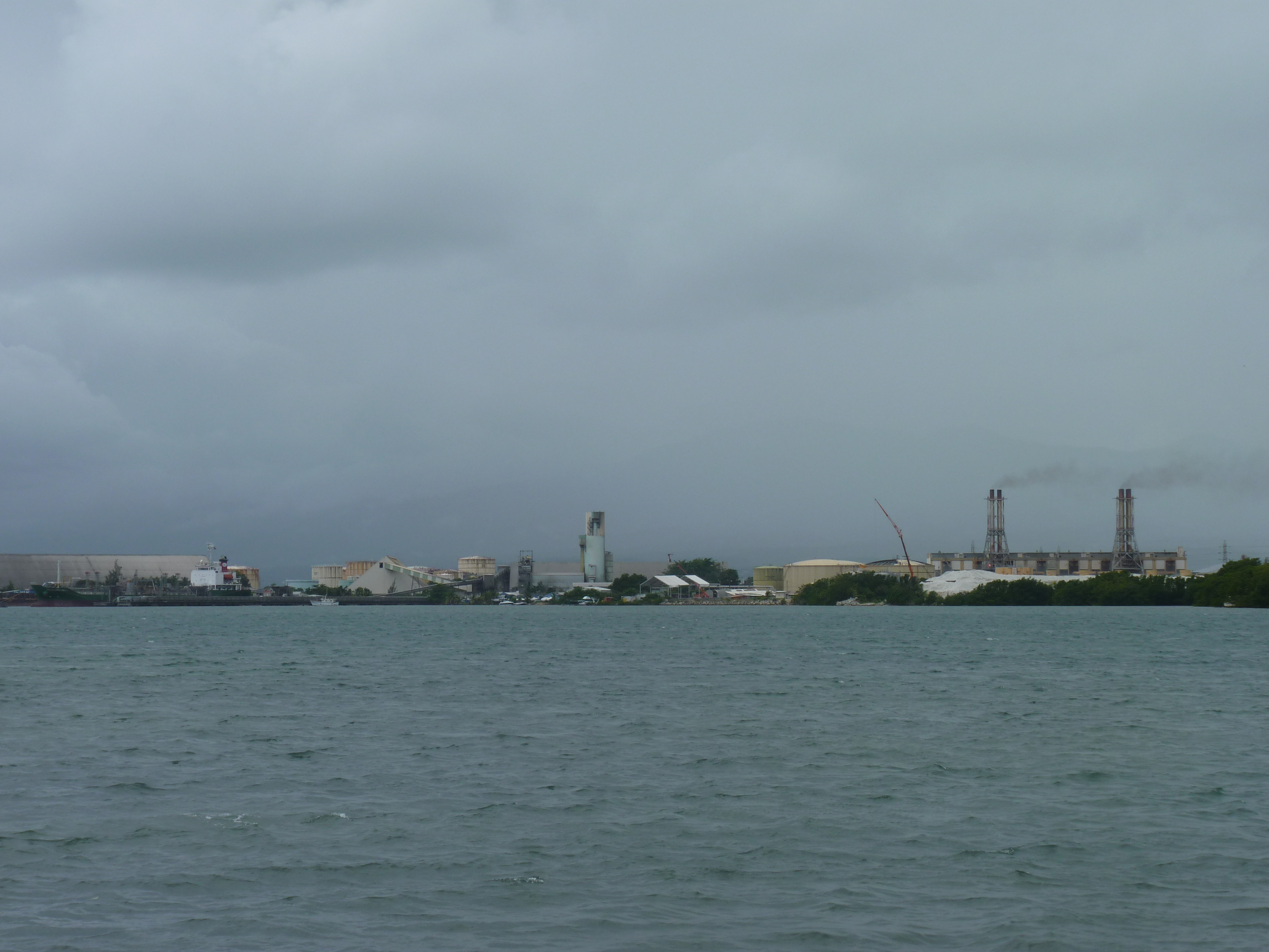 Zone Industrielle de Jarry vue d'ensemble